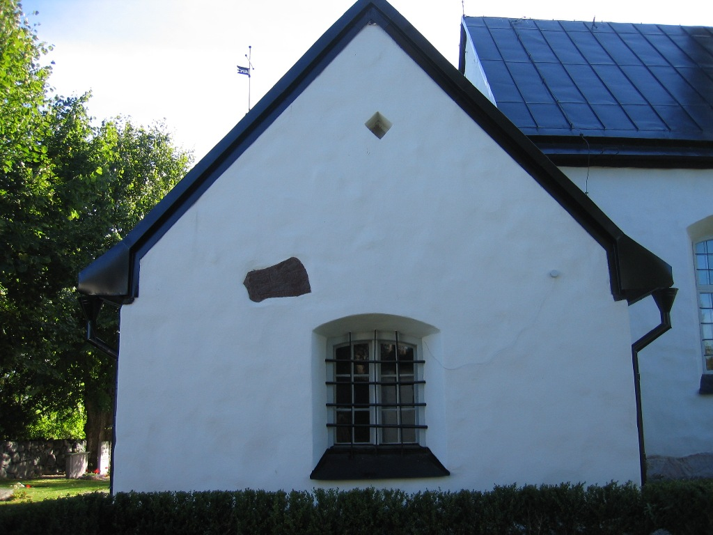 Runsten U 23, Hilleshögs kyrka. Hilleshögs kyrka med ett av fragmenten av runsten U 23 inmurad i kyrkas yttervägg. Se även Runsten U23,1.jpg (som även syns på denna bild) och Runsten U23,2.jpg